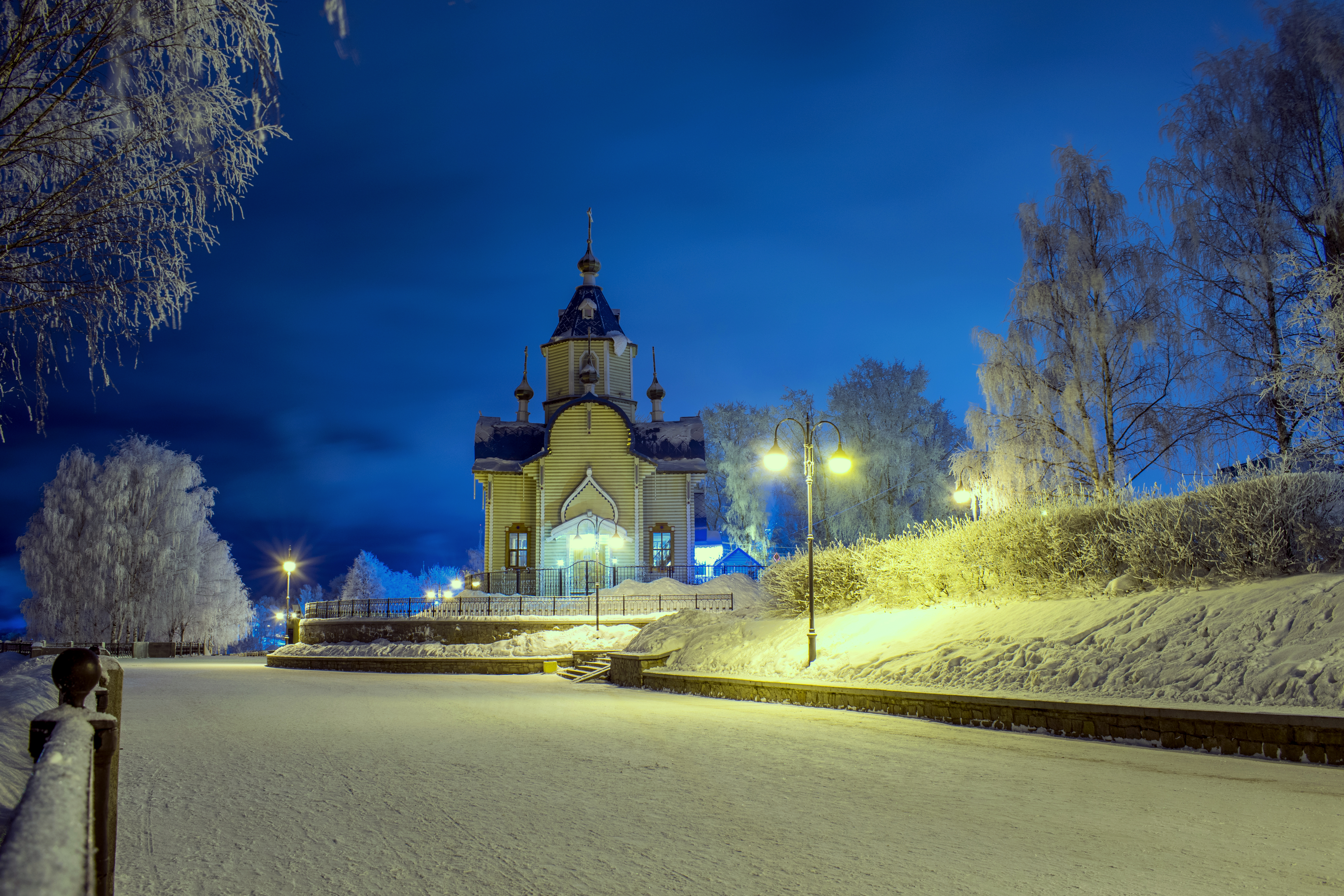 Федоровская церковь на набережной Грина в г. Кирове This image has been uploaded for Wikivoyage travel guide on Кировская область